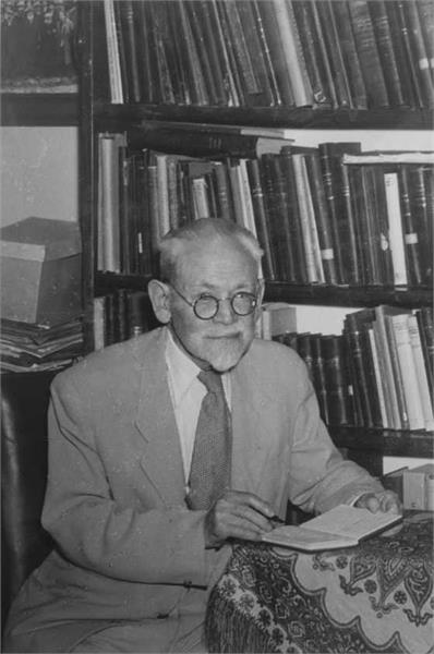 ירושלים - פרופסור יוסף קלאוזנר